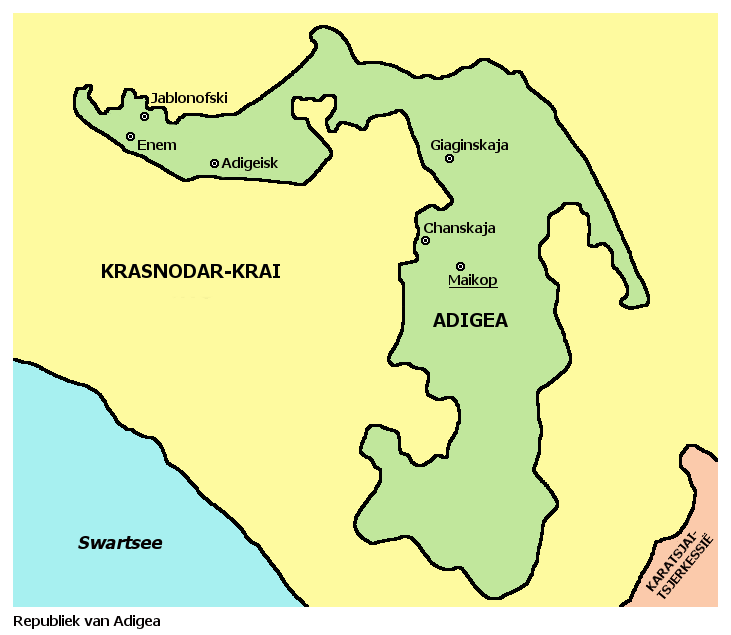 Kaart van Adigea, Rusland